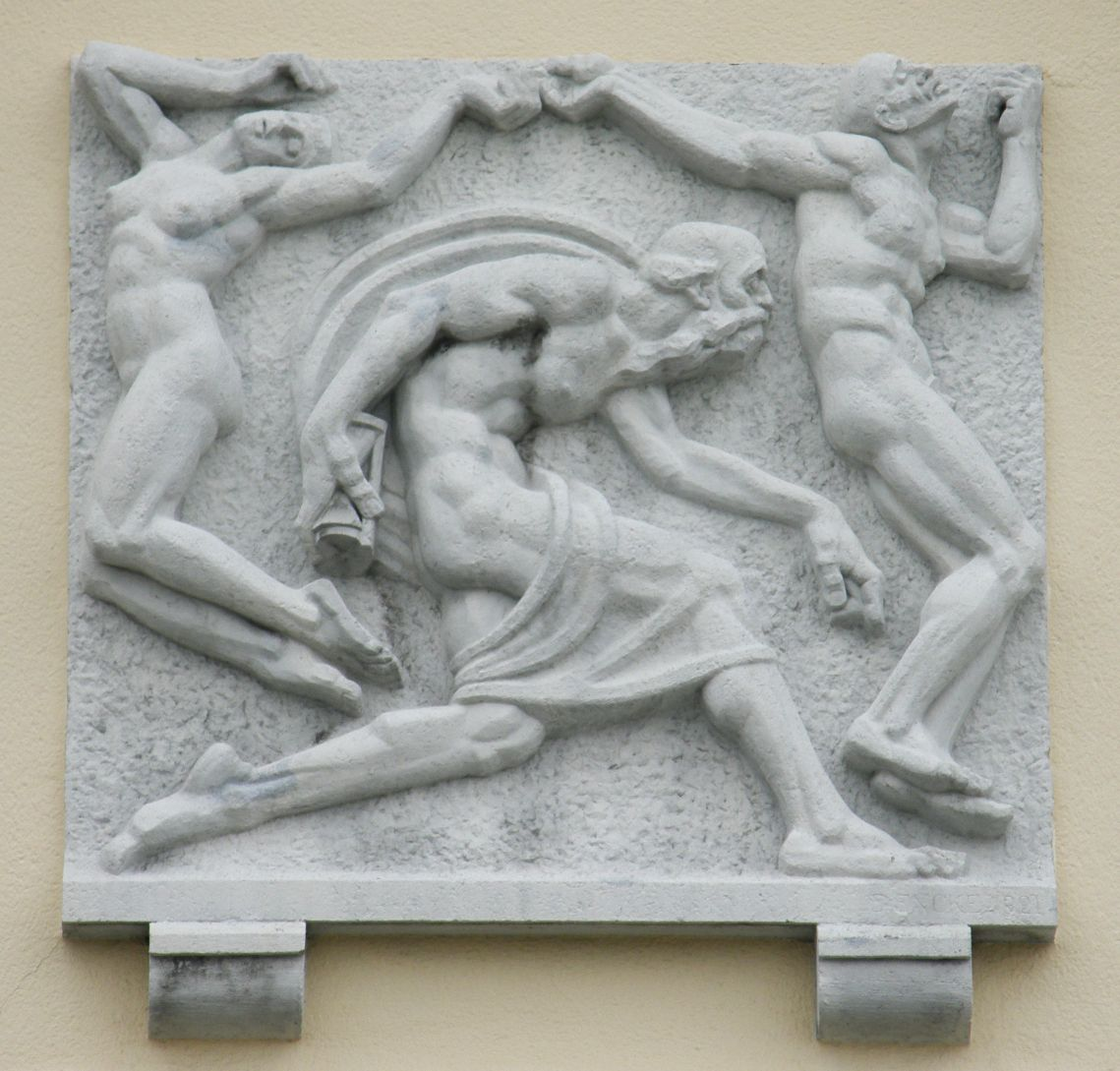 Relief "Die eilende Zeit" (Chronos darstellend) von Eberhard Encke am Krematorium Wilmersdorf auf dem Friedhof Wilmersdorf in Berlin